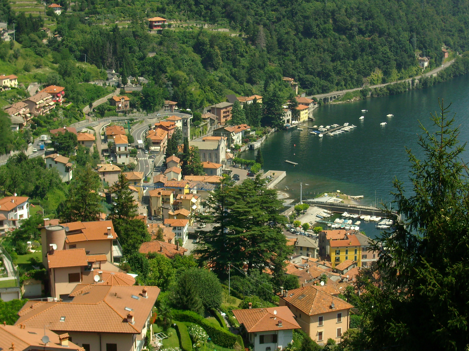 Argegno - Vista panoramica dalla strada per Schignano